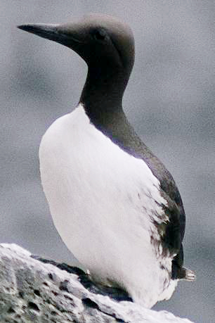 Uria aalge aalge fotografato agli inizi di luglio 2004 sul Látrabjarg in Islanda occidentale.